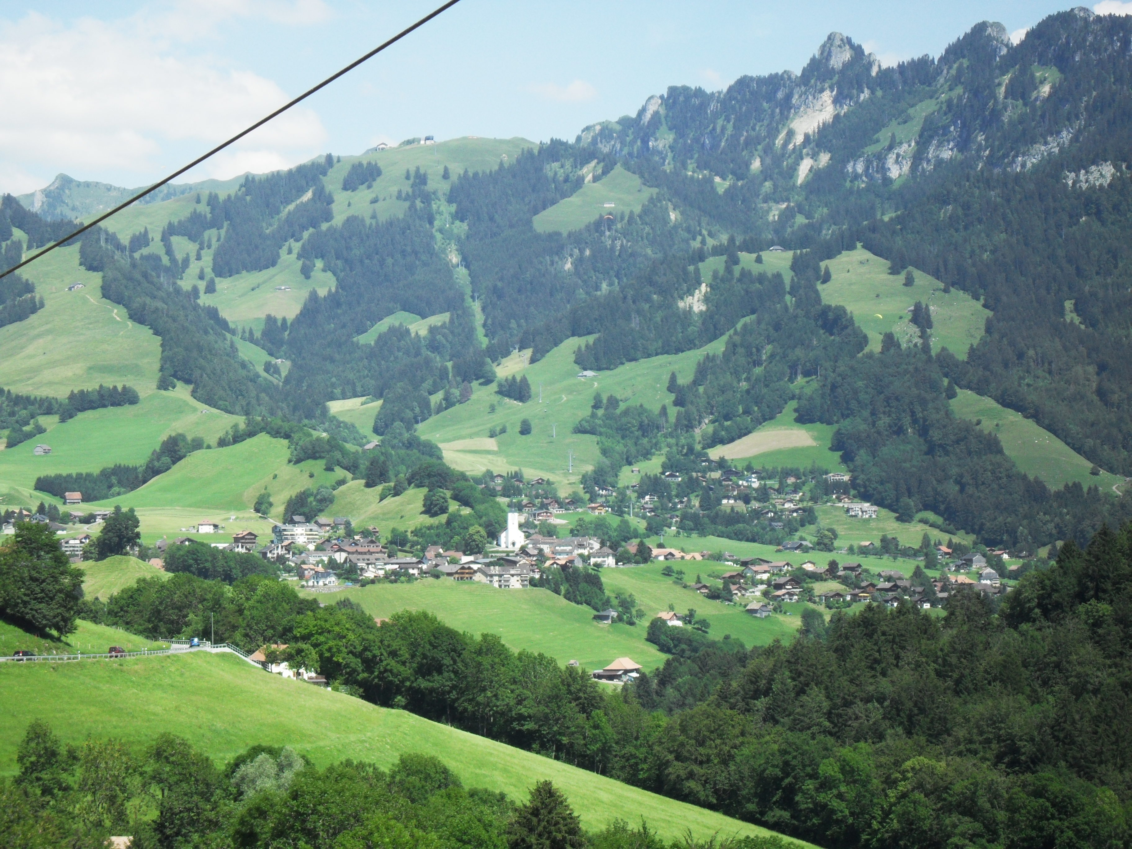 Vu sur Charmey de Crésuz